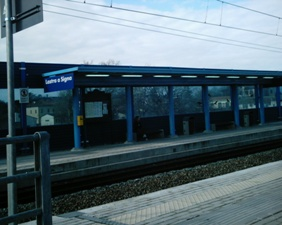 Fermata ferroviaria di LAstra a Signa_2